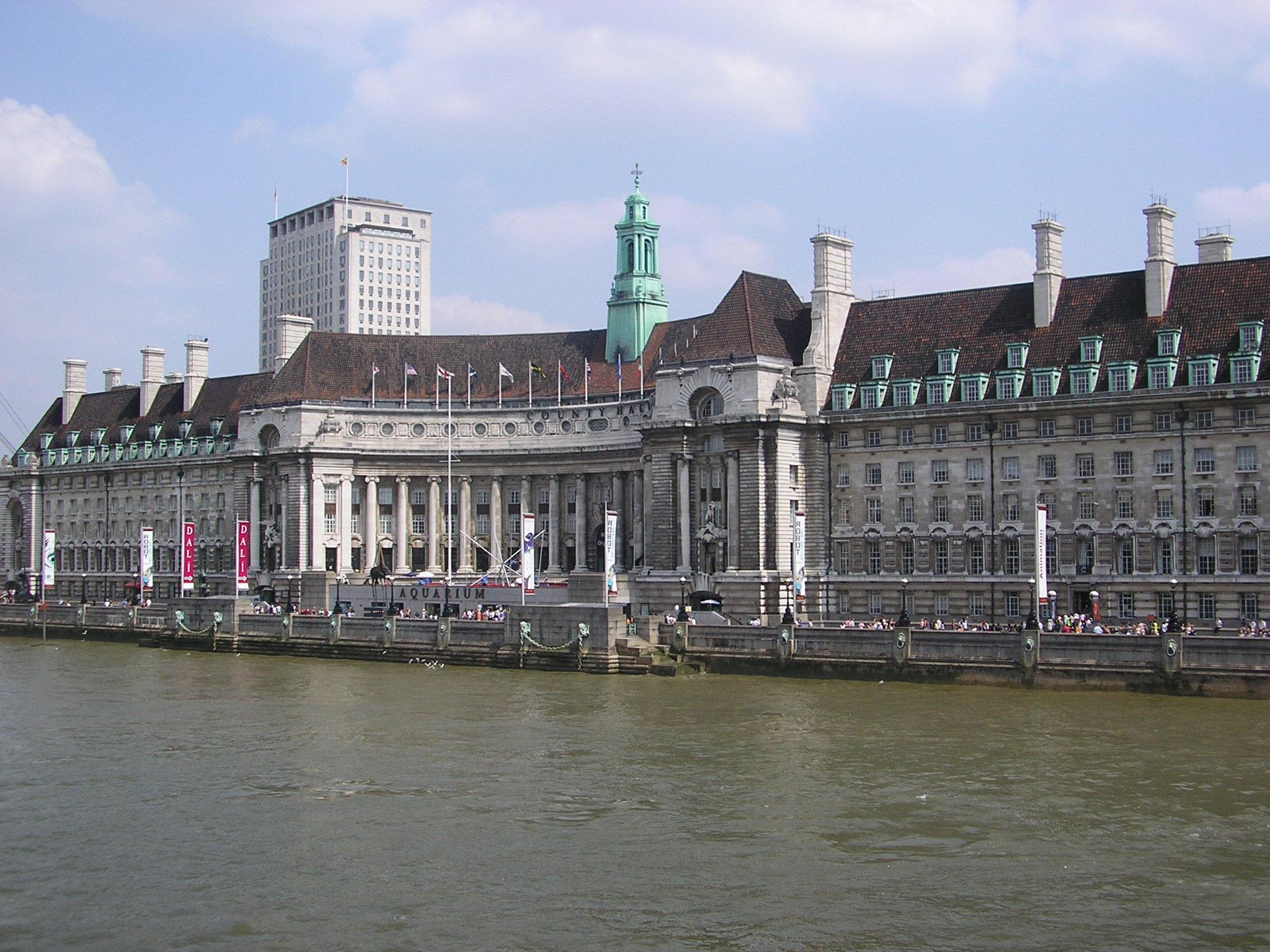 El Acuario de Londres desde el Puente de Westminster